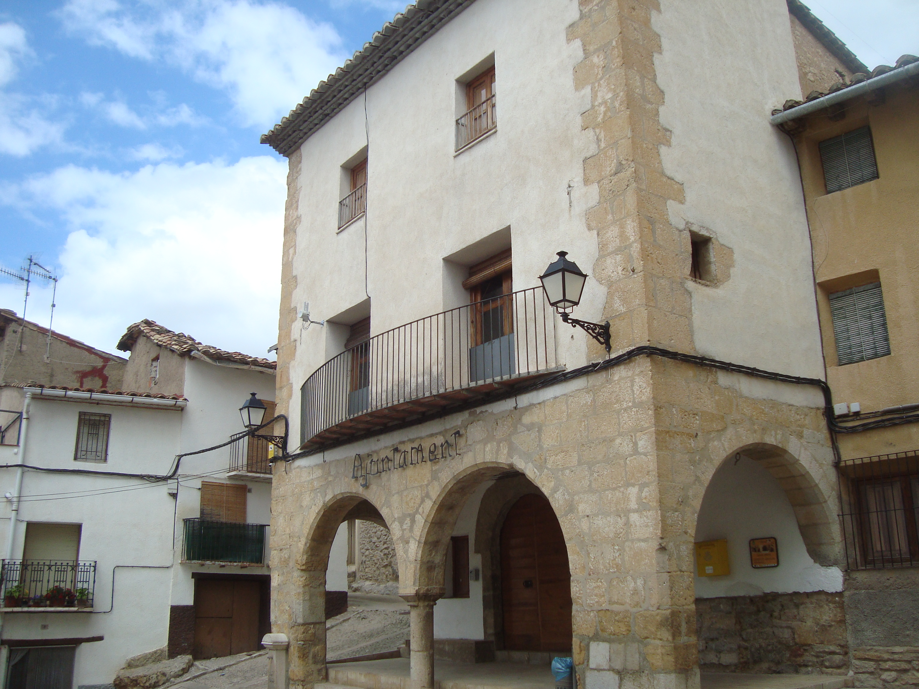 Ayuntamiento de Villores (Castellón)